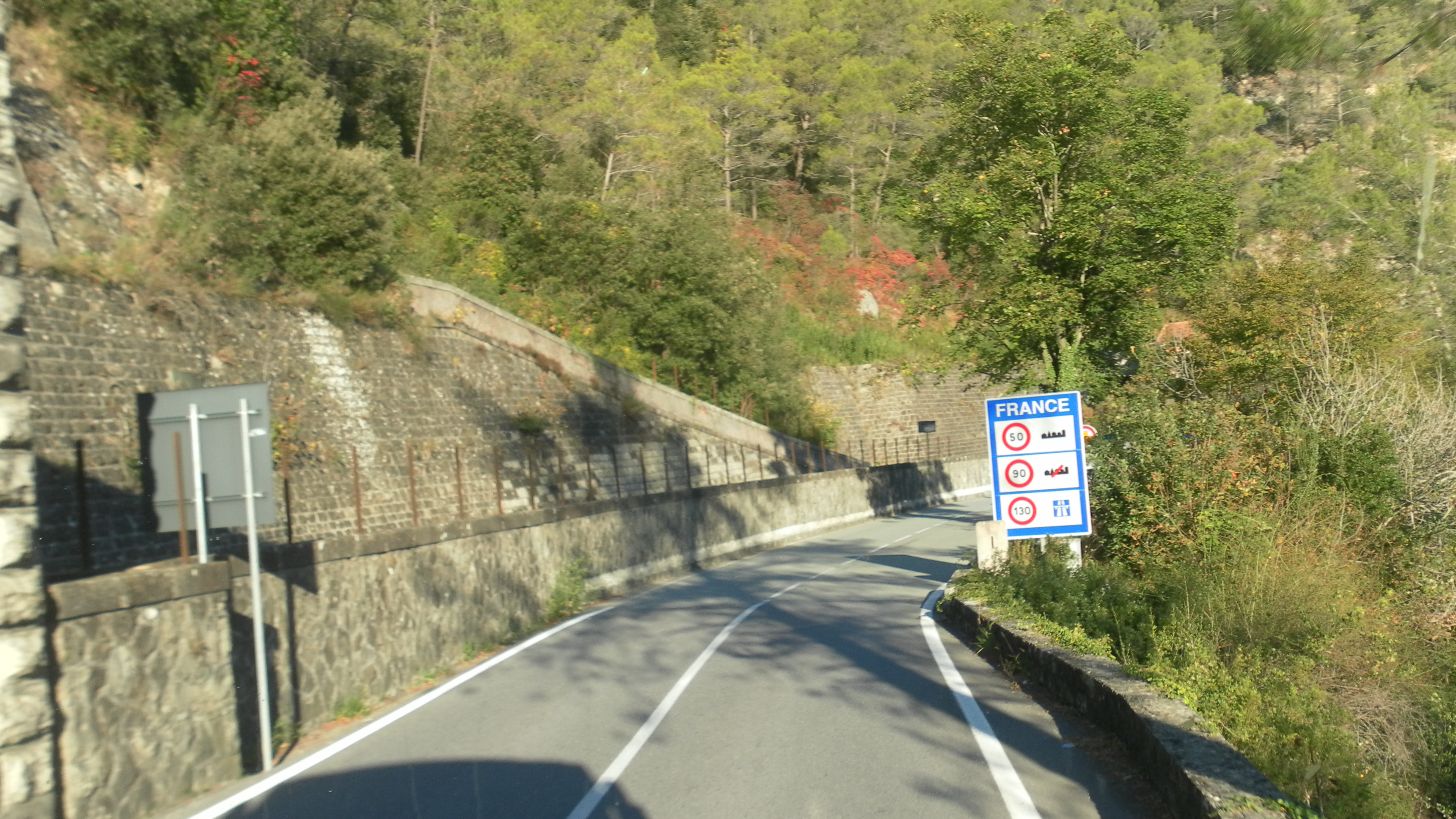 Confine tra Italia e Francia tra i comuni di Breil-sur-Roya (Francia) e Olivetta San Michele (Italia). Il confine è stato fissato nel 1947.